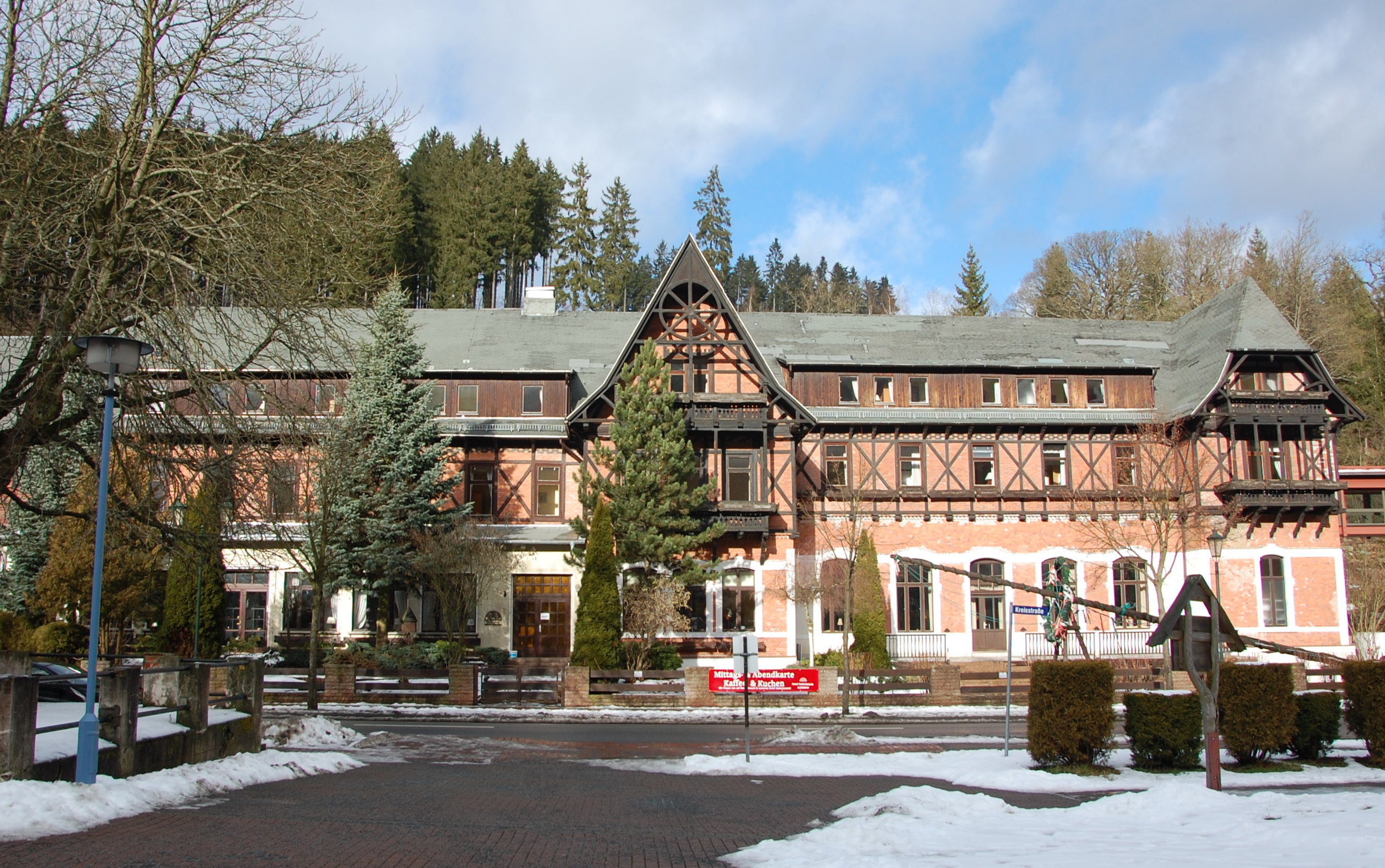 Haus Kreisstraße 4 in Alexisbad